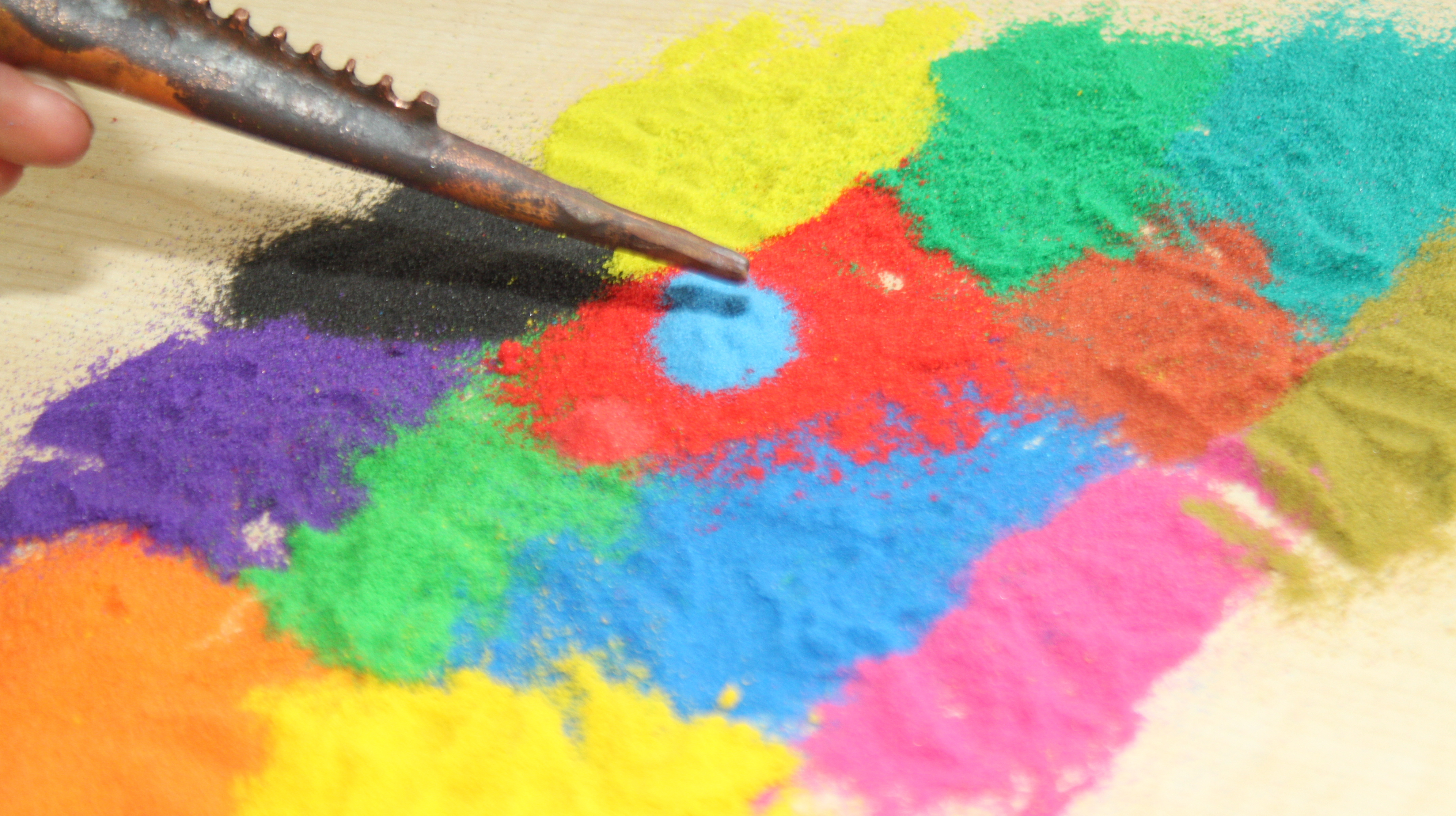 Barevný písek k tvoření obrázků z barevného písku, nebo k dekoracím.